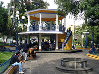 calle de coatepec a un lado del palacio municipal